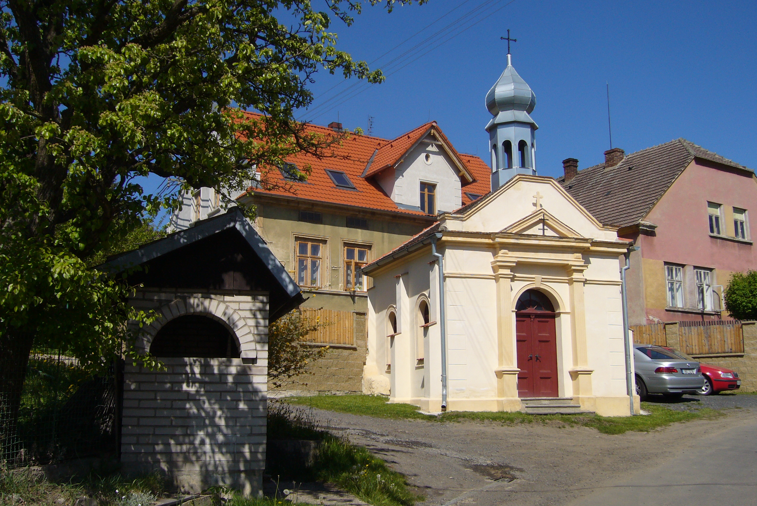 Skalice - náves s kaplí svatého Prokopa